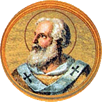 Il mosaico raffigurante papa s. Agapito I nella Basilica di san Paolo fuori le mura